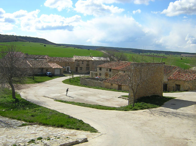 El charco de Torremochuela